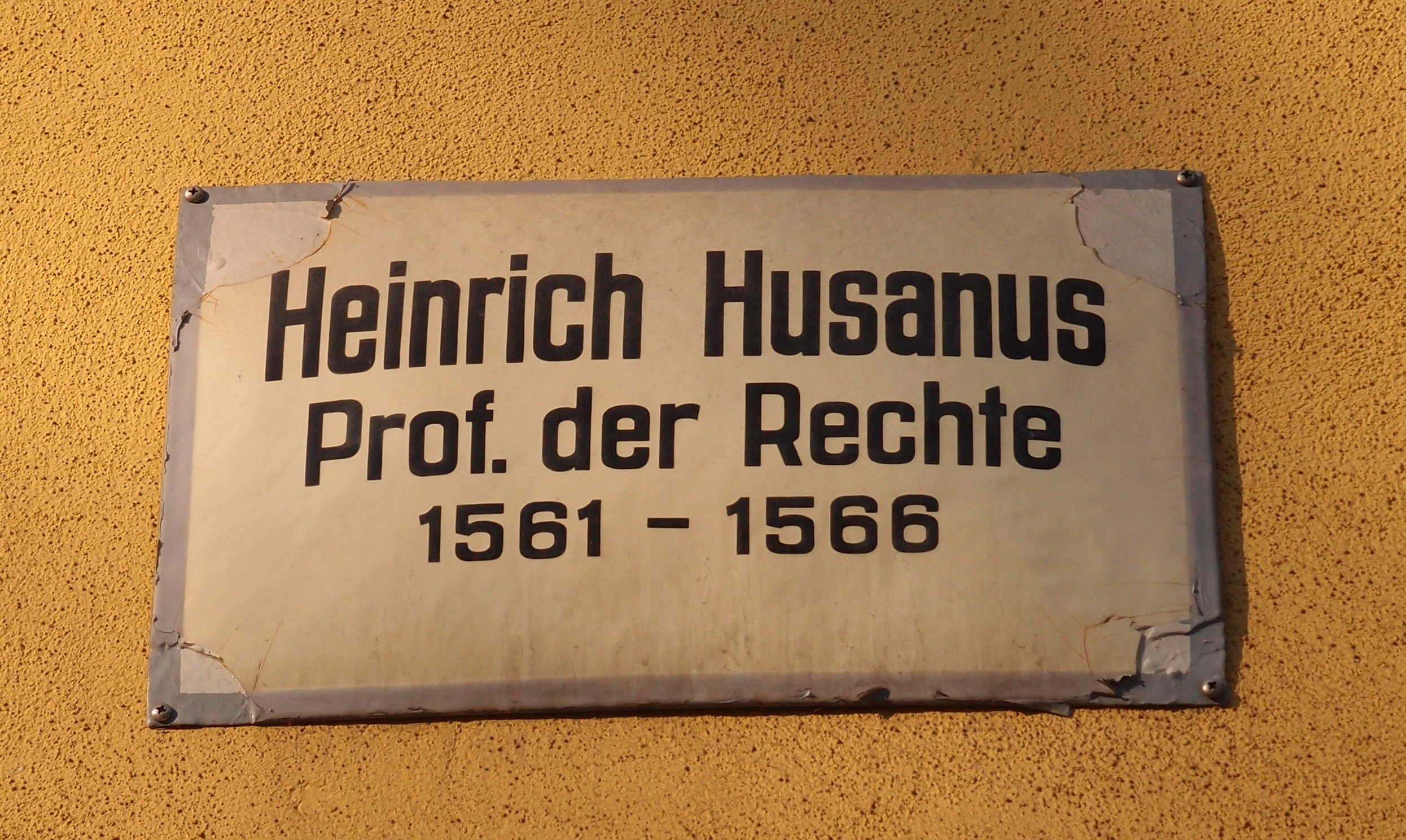 Gedenktafel für den Lyriker, Juristen und Diplomaten Heinrich Husanus (1536-1587) in Jena, Fürstengraben 10